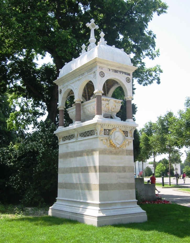 Zentralfriedhof Grab Carl Ritter von Ghega